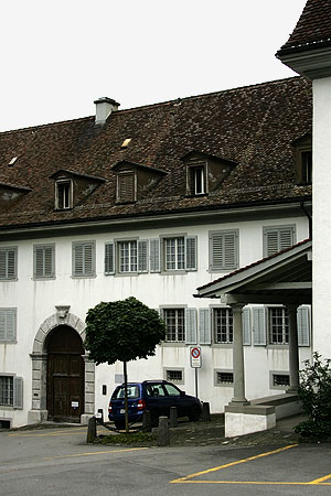 Stans: ehem. Frauenkloster St.Klara (Schule Pestalozzis)